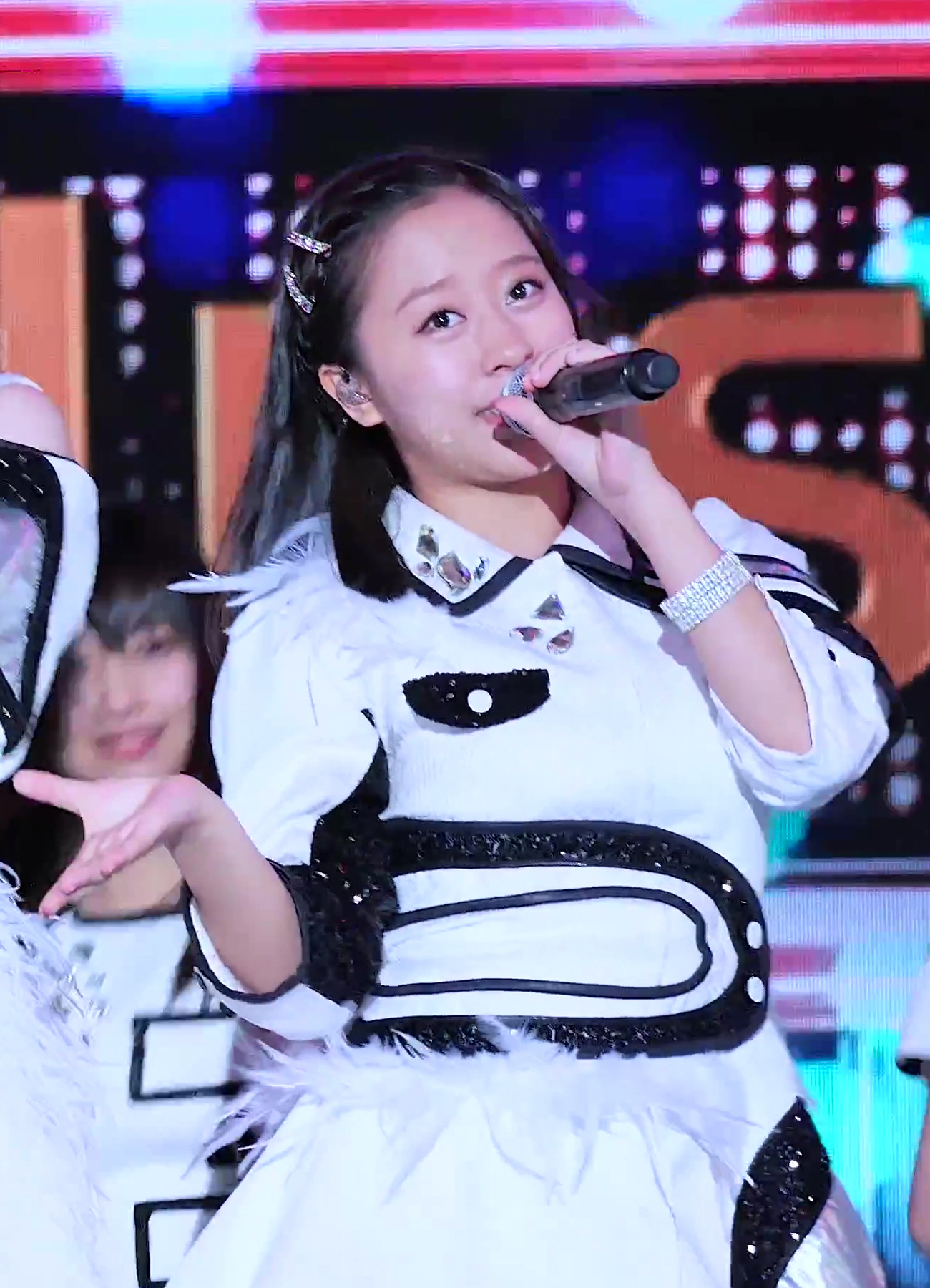 161006 AMN 빅 콘서트 - 후쿠무라 미즈키 우타카다 새터데이나이트 직캠